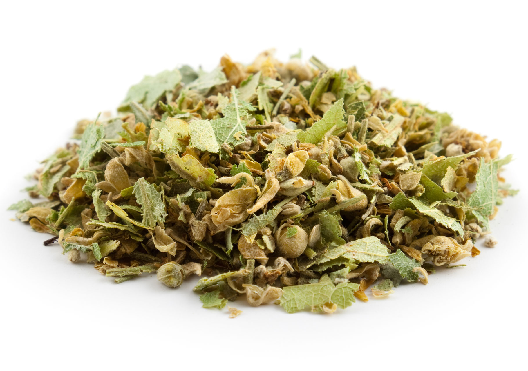 Lindenblütentee aus Silberlindenblüten